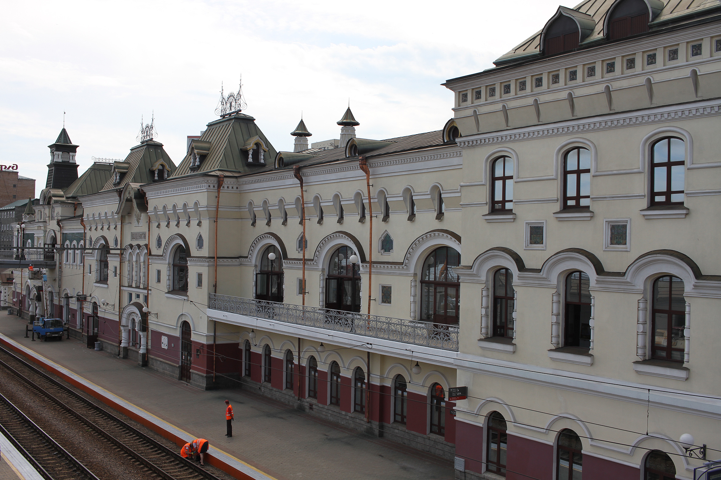 Здание железнодорожного вокзала, связанное с революционными событиями 1905-1906 гг. и борьбой в годы Гражданской войны и интервенции 1917-1922 гг.: улица Алеутская, 2 (площадь Вокзальная), Владивосток, Приморский край